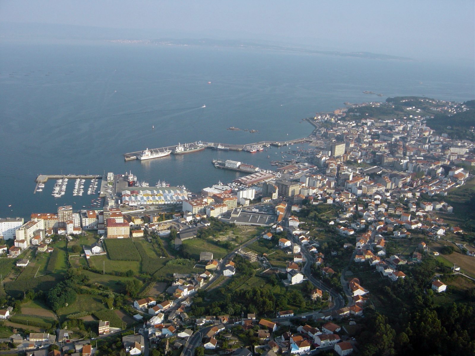 Localidad del municipio español de ribeira